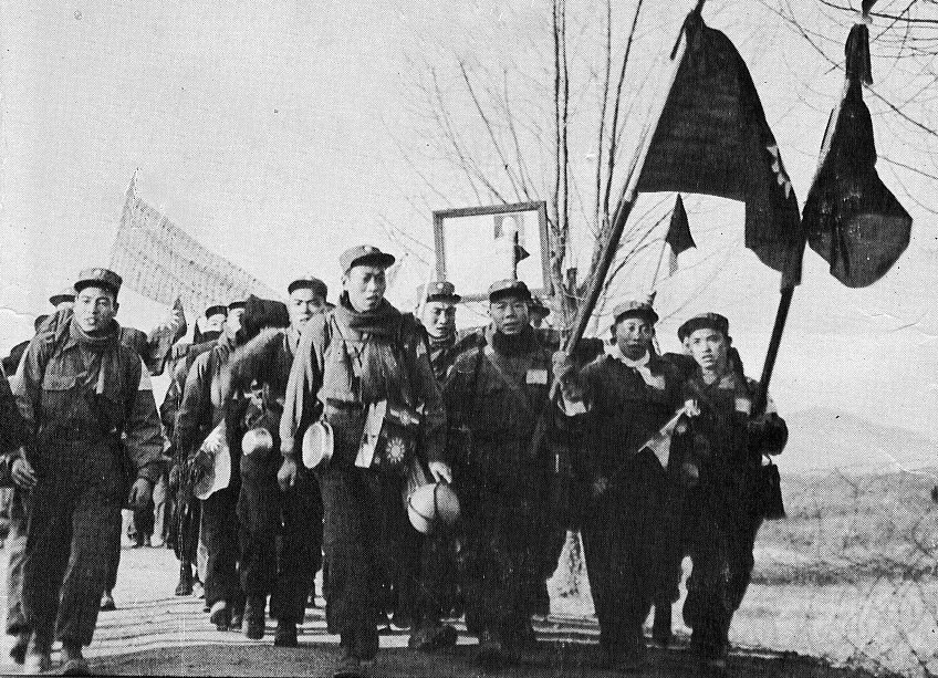 中文（中国大陆）: 中国人民志愿军战俘赴台湾。